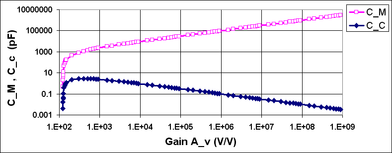 Compensation capacitance vs. gain